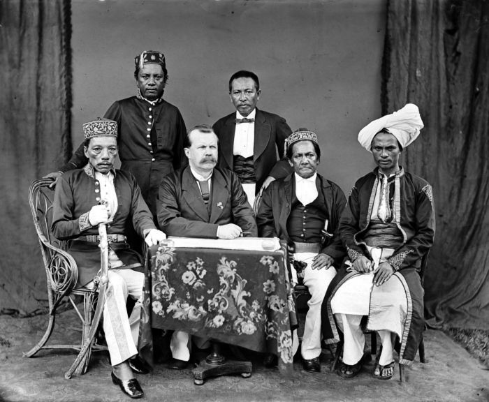 Negatief. Portret van de raja, assistent-resident en hoofden, Gorontalo, Sulawesi